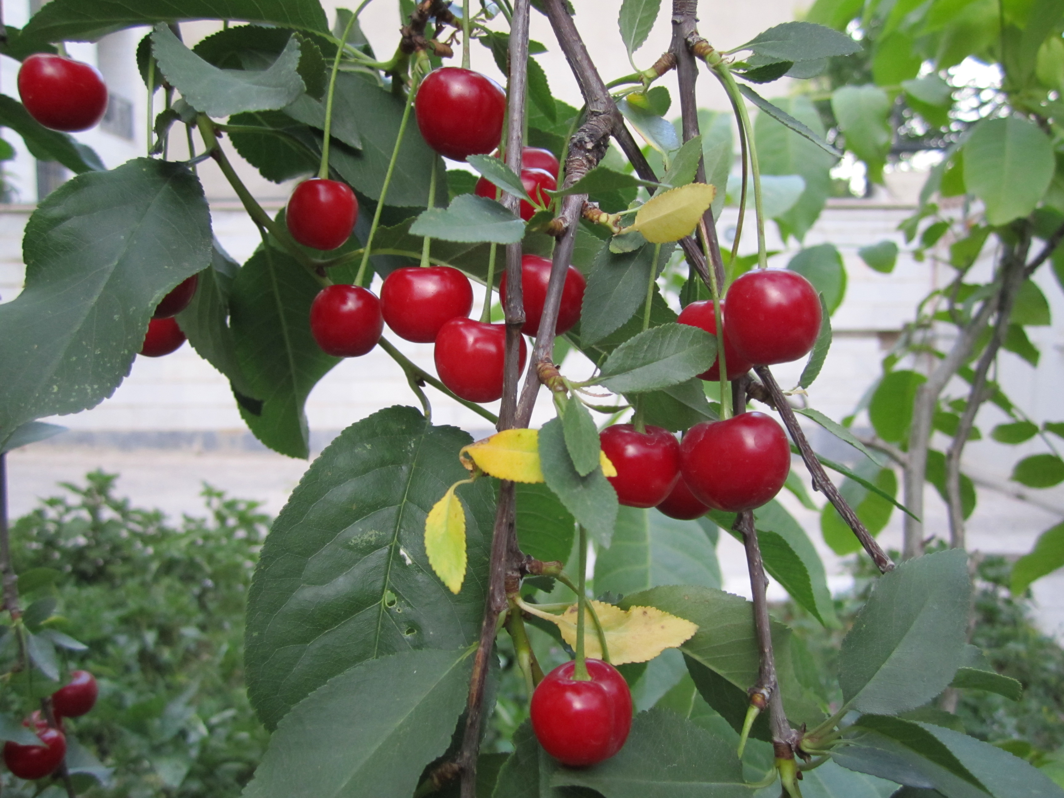 آلبالو